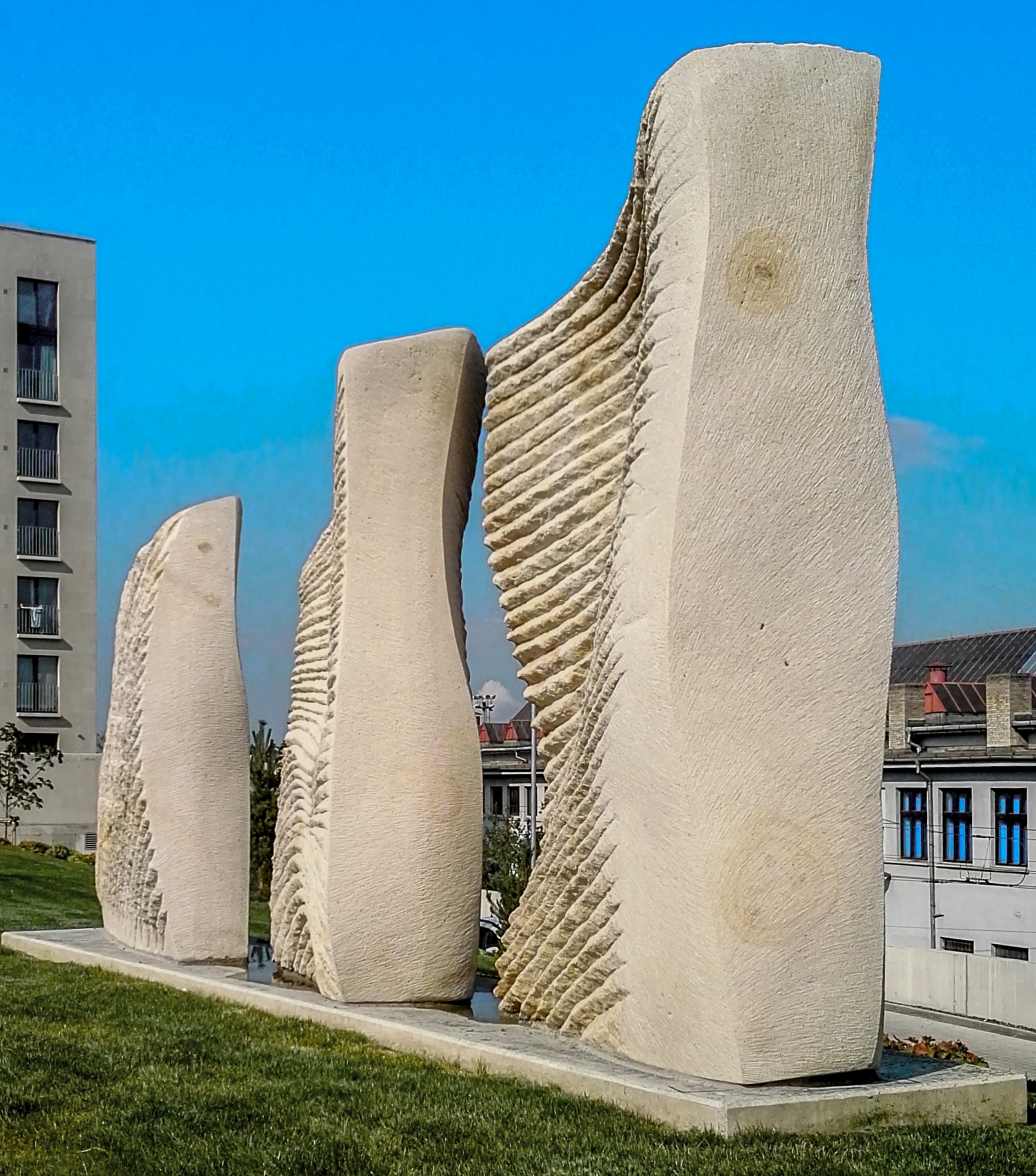 Petr Váňa, sousoší Naděje, Láska a Víra v Praze na Krejcárku, 2020